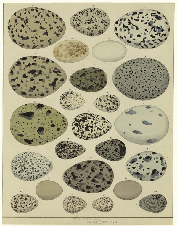 Bird eggs